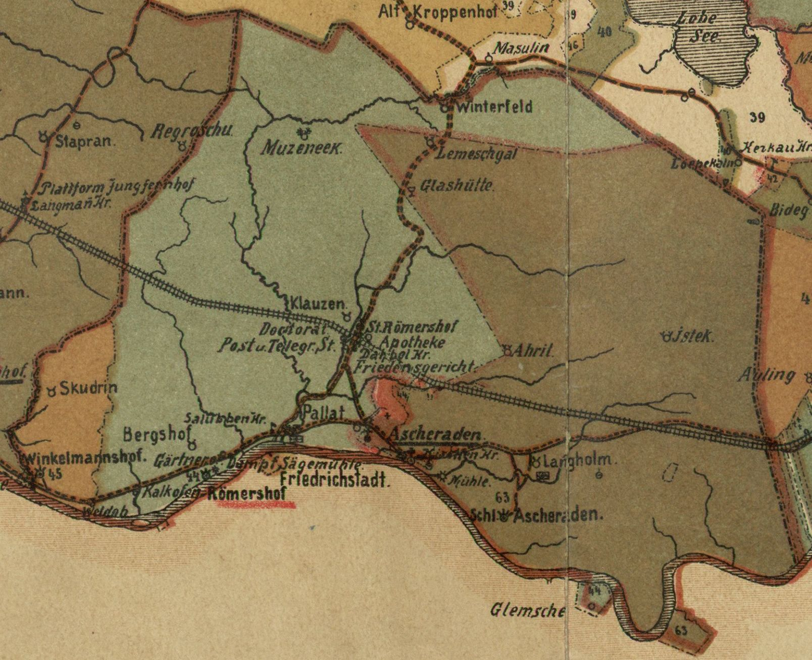 Aizkraukle kihelkonna mõisad 1905. aastal